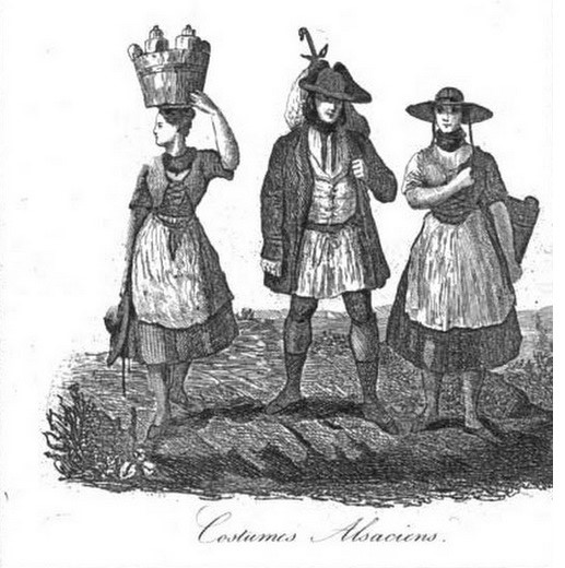 Costumes Alsaciens du Bas-Rhin.